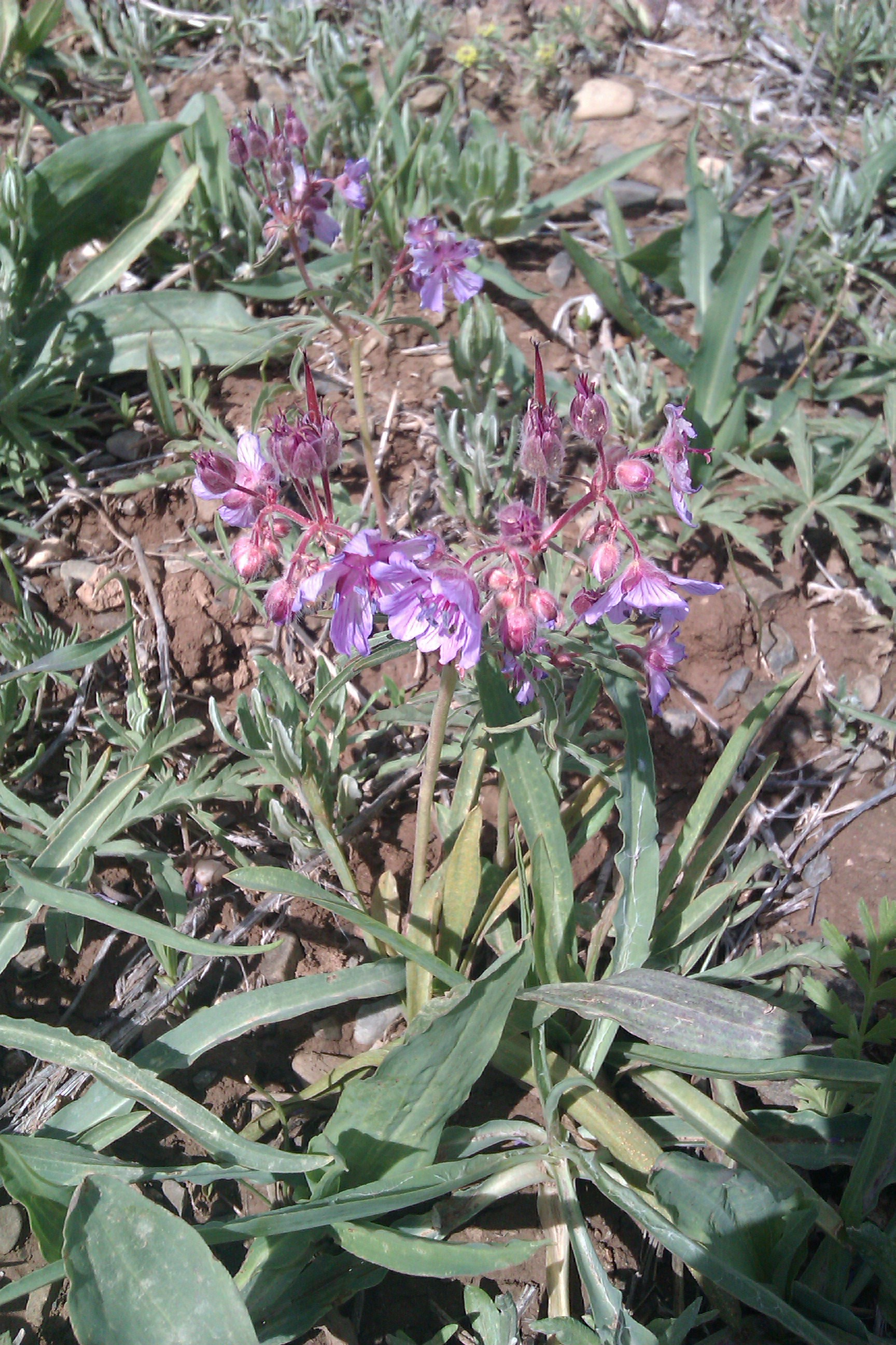 گونه های گیاهی روستای ییلاقی فرج آباد